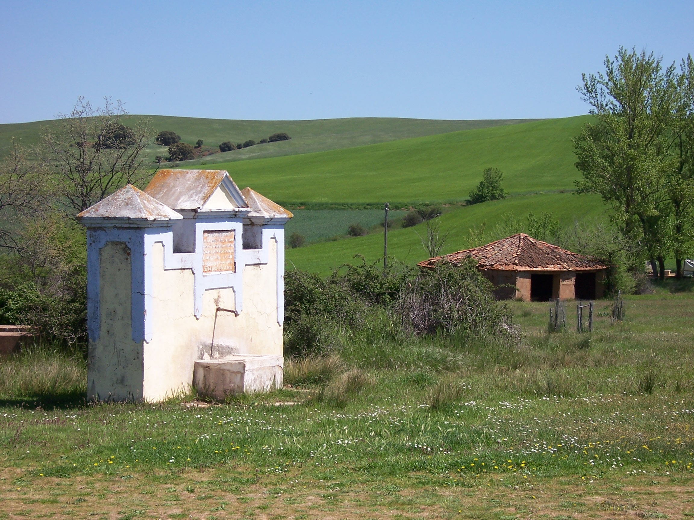 Esta fuente se contruyó con los trabajos del pueblo y ayuda de D. Antonio Alonso Bernal Cuesta, hijo de Valvieja bajo la dirección del ingeniero D. Isidro Sanchez. Inaugurada el dia 13 de Junio de 1935.